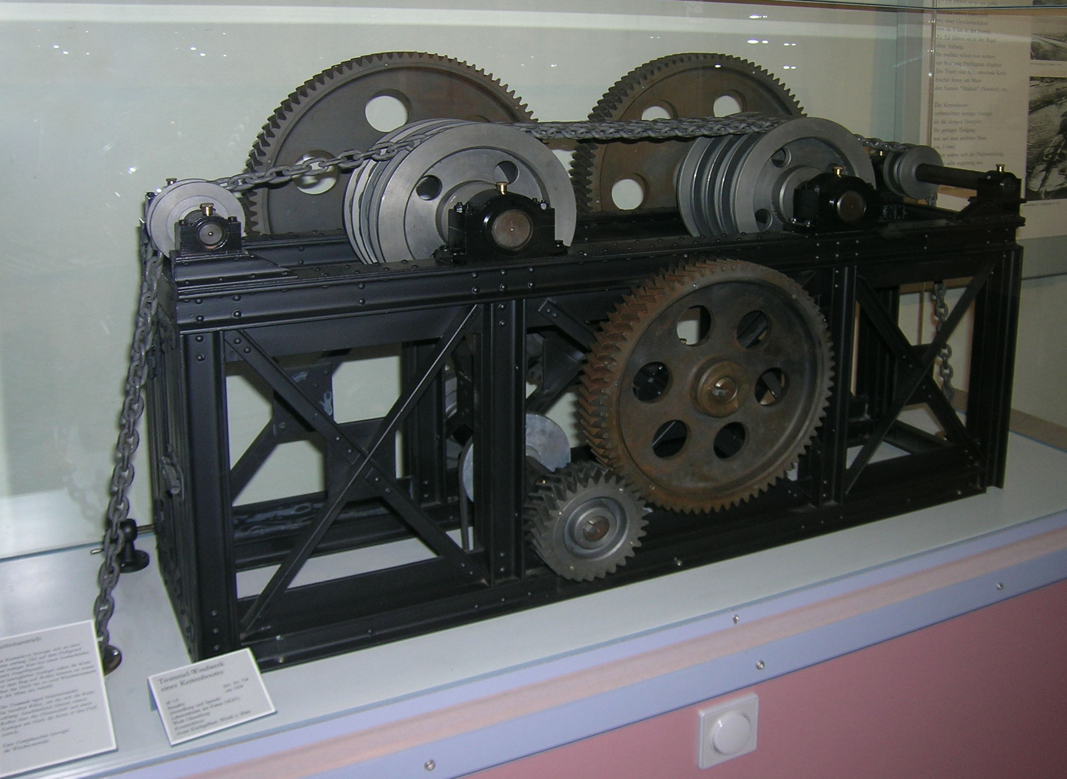 Schifffahrts- und Schiffbaumuseum Wörth am Main (Modell einer Doppelwinde eines Kettenschleppschiffs im Maßstab 1:5)